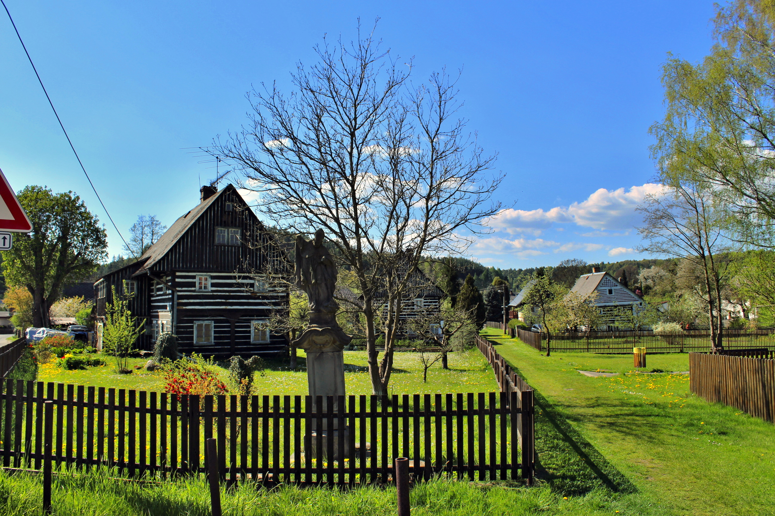 Velenice